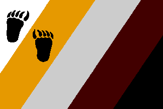 Deuxième drapeau de la communauté Bear